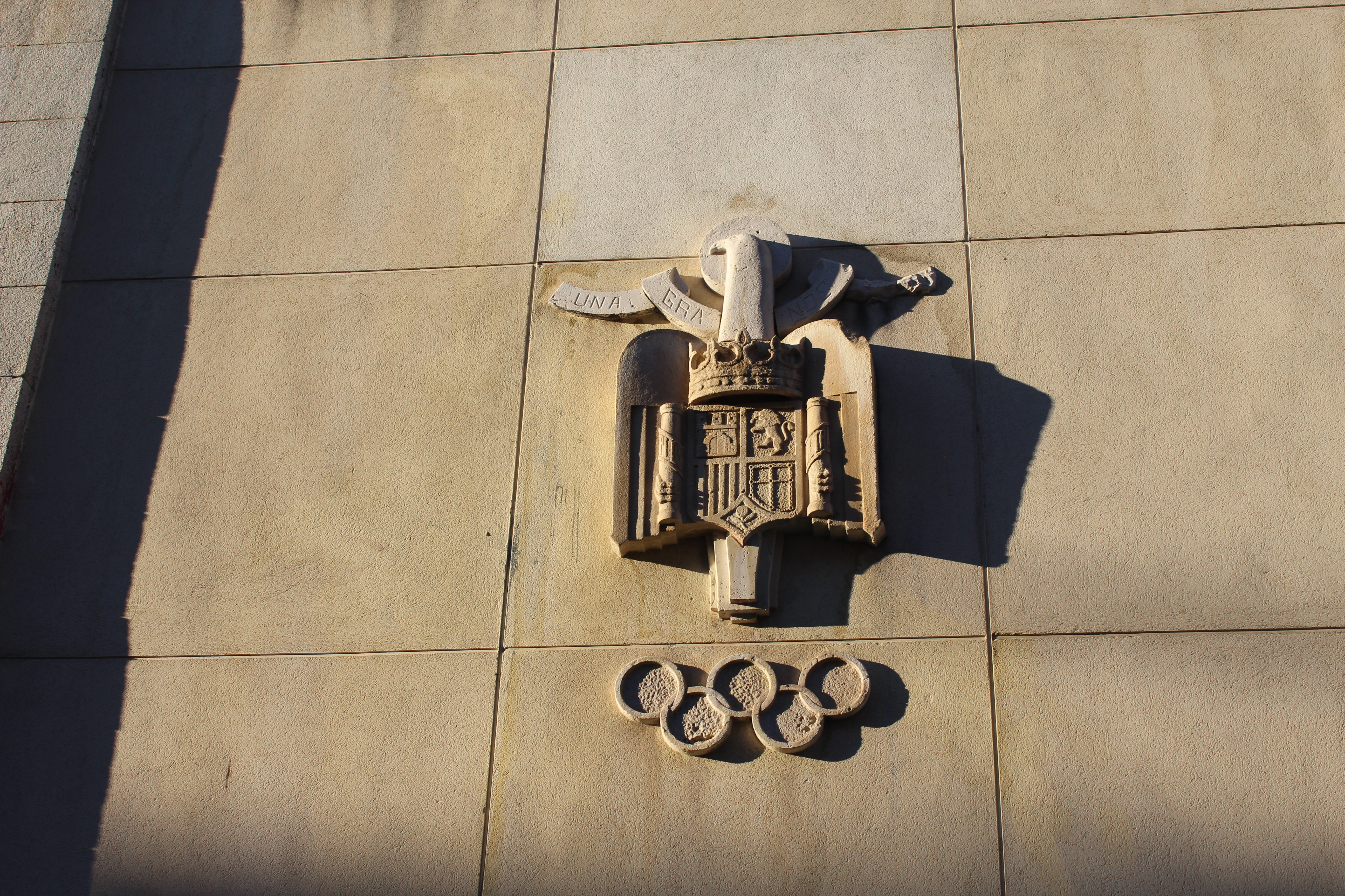 Detalle en la Fachada del Centro Deportivo Municipal Gimnasio Moscardó